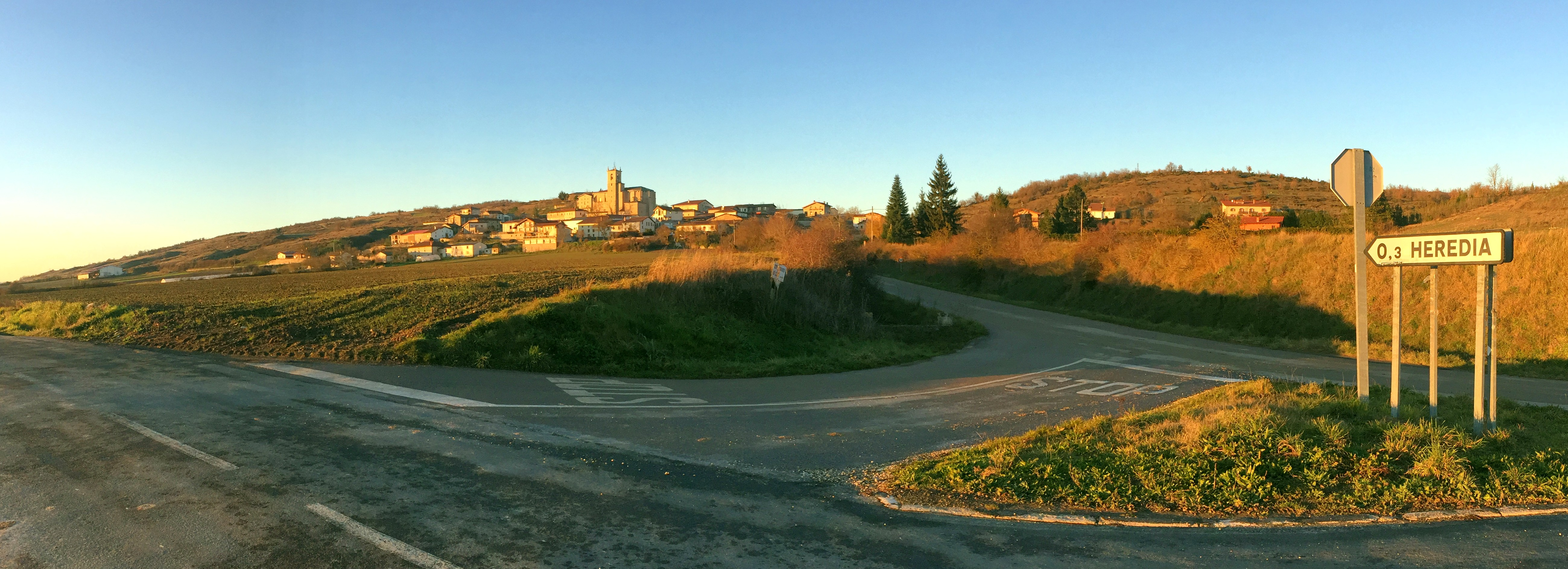 Arabako Deredia herria errepidetikneguko iluntzean